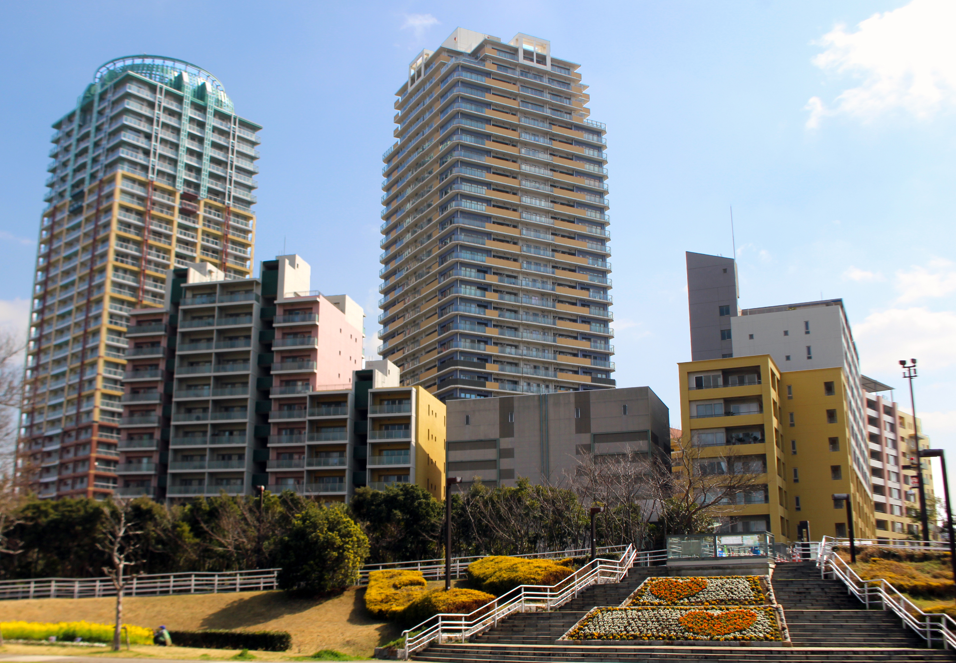 幕張海浜公園よりセントラルパークイースト幕張パークタワー・ウエストシータワーを望む